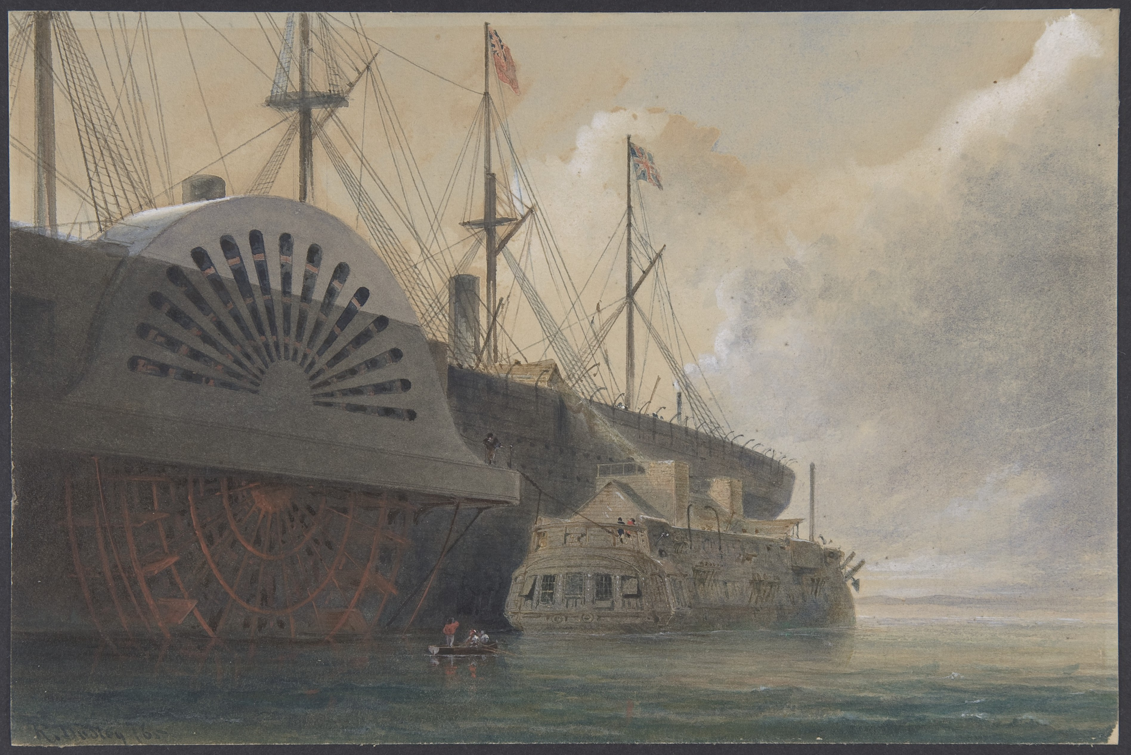 Drawing; Drawings